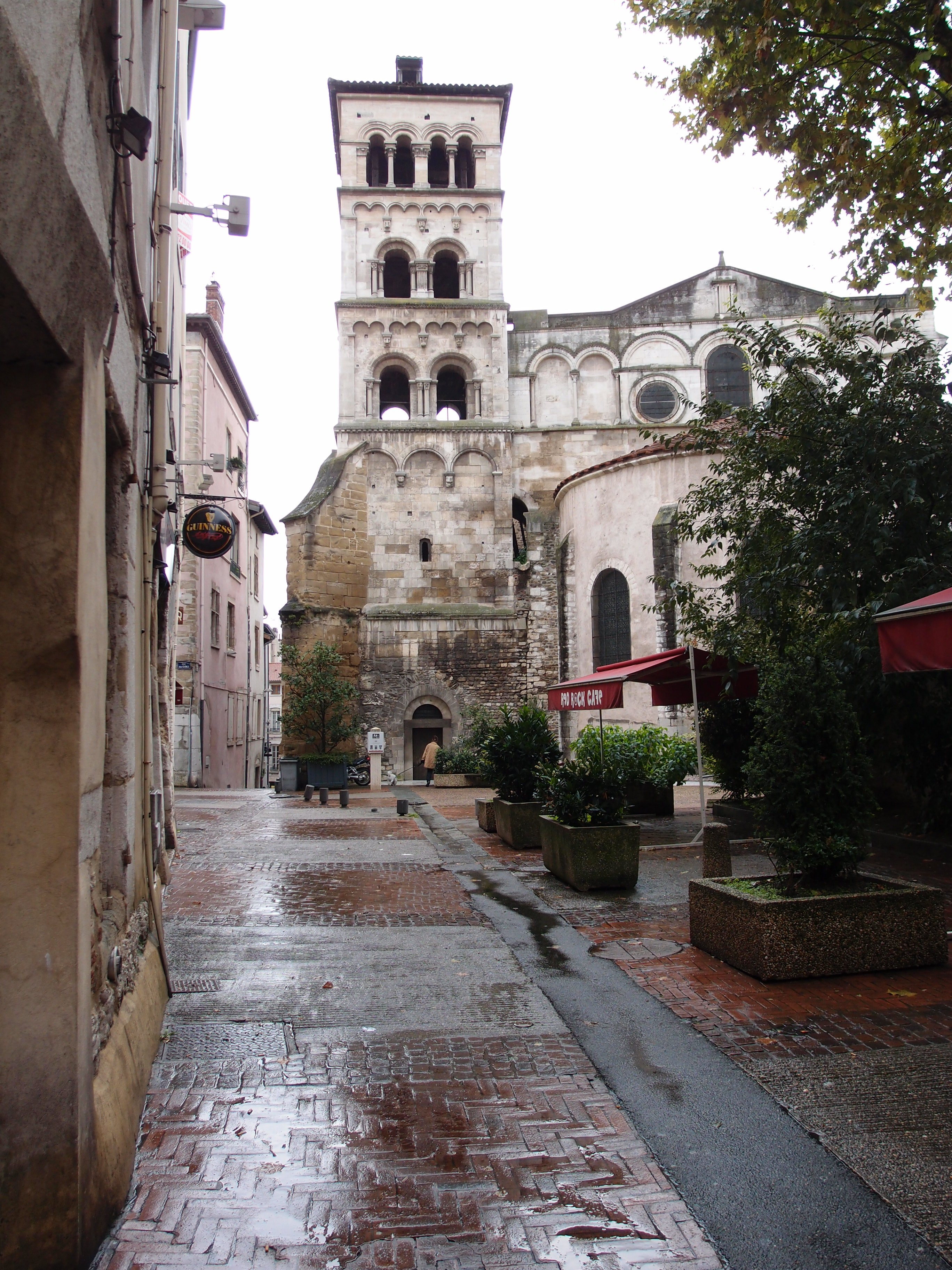 Teilansicht der romanischen Abtei Saint-André-le-Bas in Vienne (Isère) Datum: 22.09.2012 Urheber: M. Pfeiffer alias Benutzer:Gordito1869 Quelle: privates Fotoarchiv des Urhebers